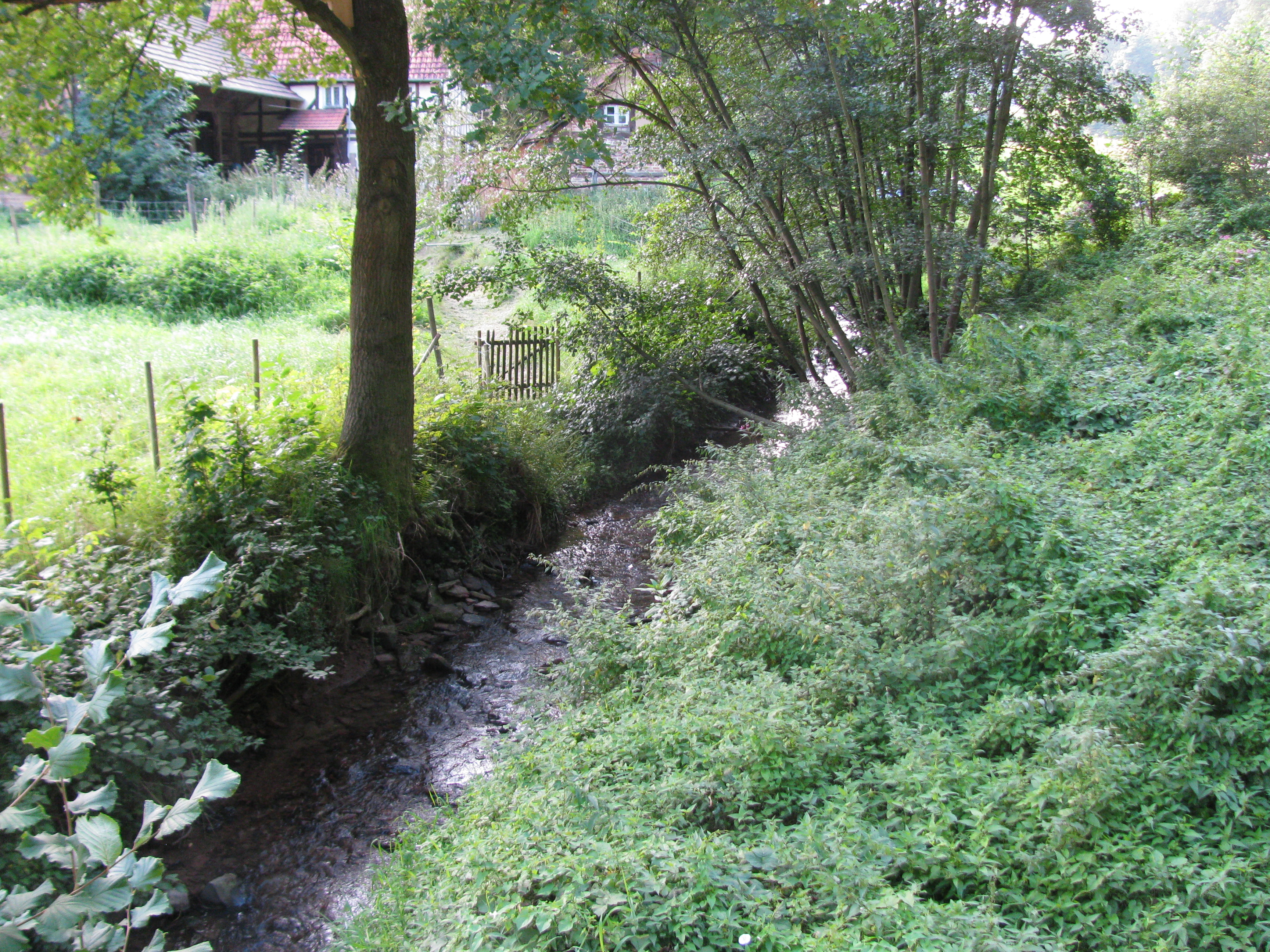 der Osterbach oberhalb der Brücke der Kreisstraße